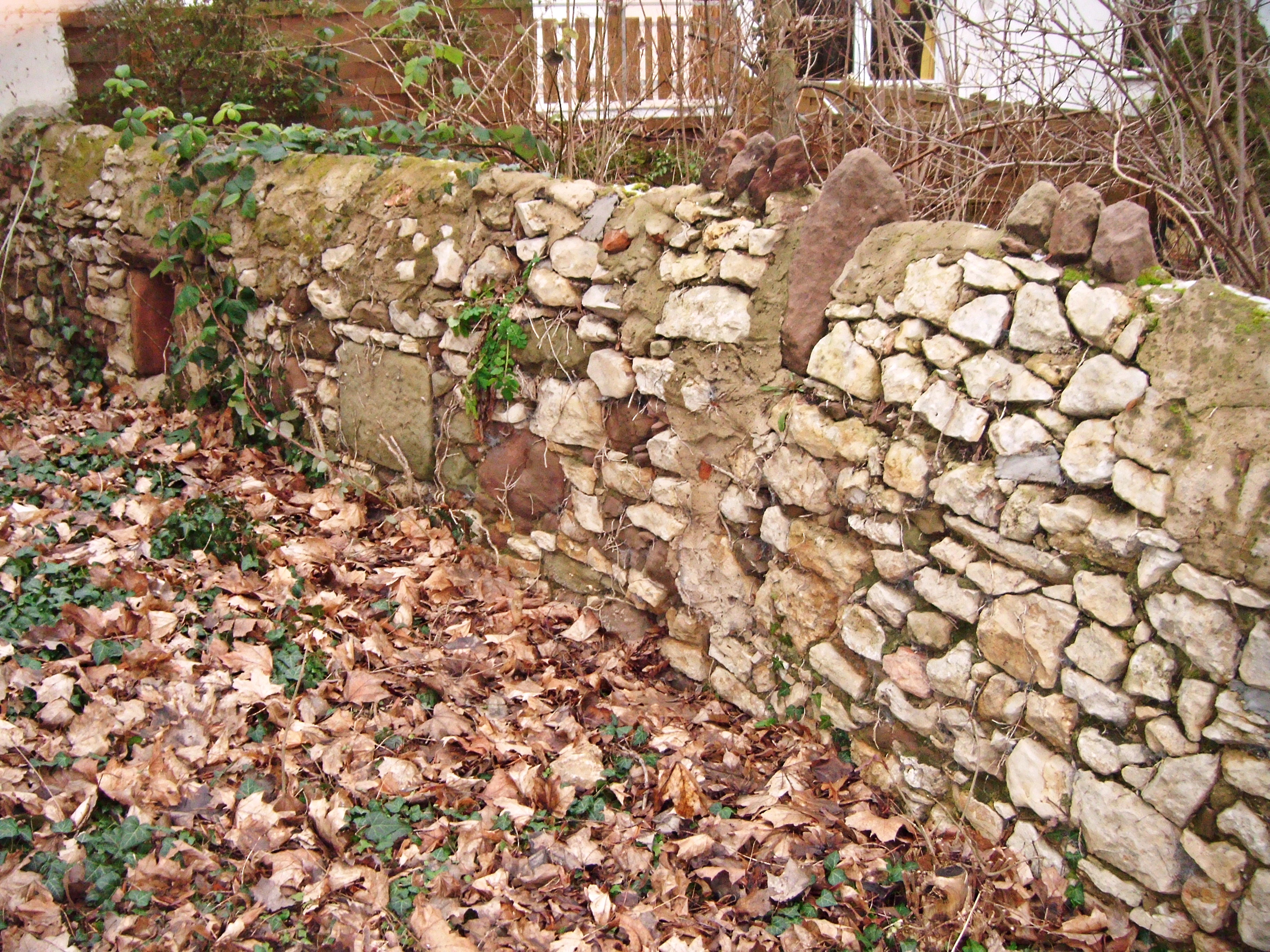 Grünstadt, Peterspark, mittelalterliche Wehrmauer (abgerissen nach 2015)